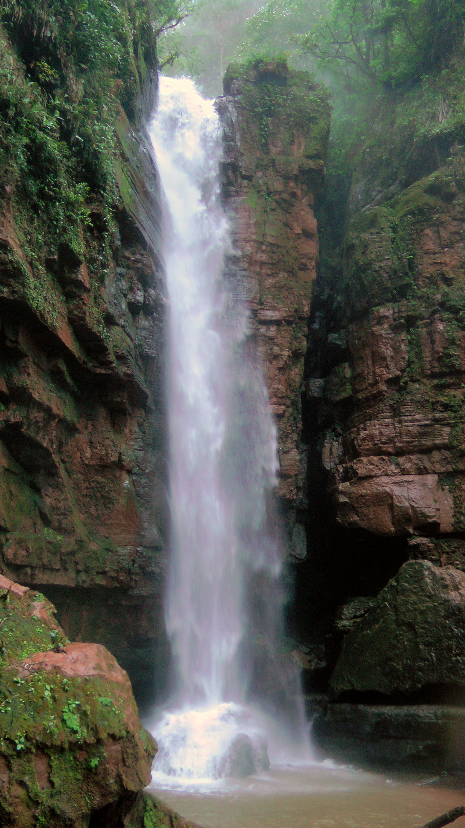 RÍO CACHIYACU DE SANTA ANA - SHAPAJA - UCHIZA